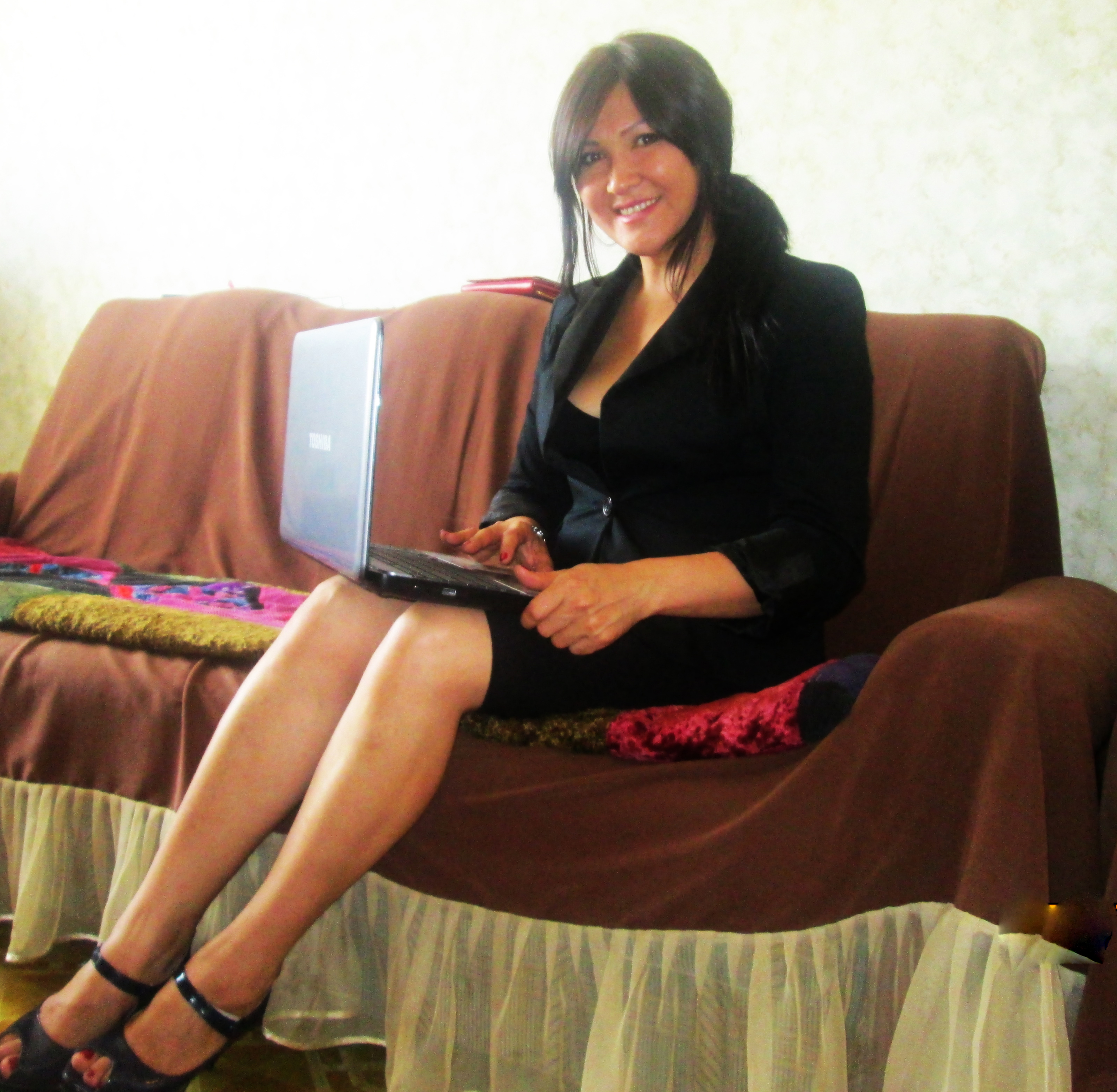 Байгабылова Махабат - киргизская актриса, исполнительница роли Бюбюсара Бейшеналиевой в фильме "Чингиз и Бюбюсара"